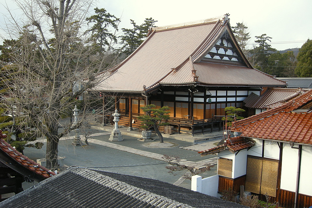 教善寺 Kyozenji Temple